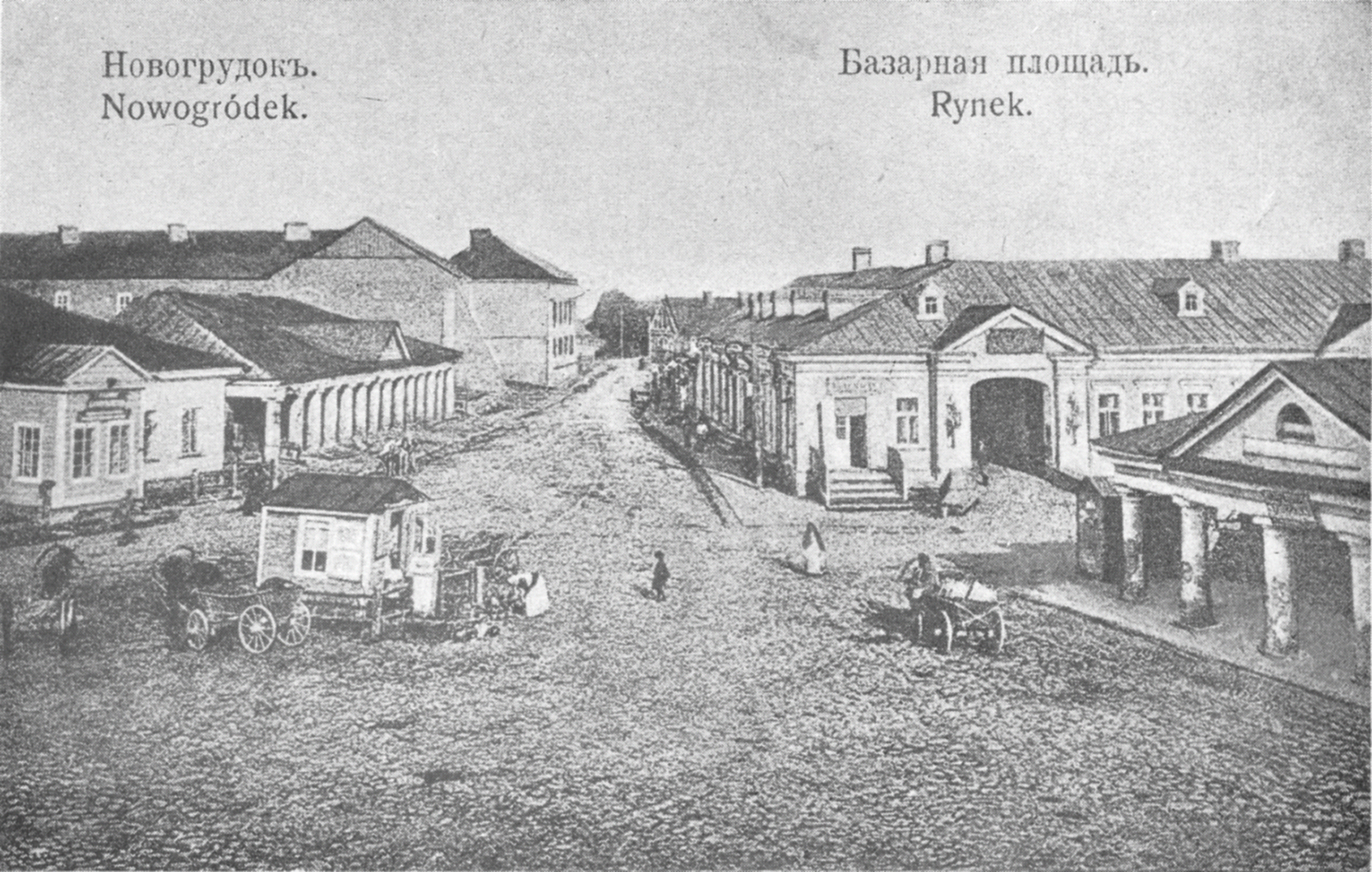 Беларуская (тарашкевіца): Наваградак (Navahradak), рог пляцу Рынку (plac Rynak) і вуліцы Траецкай (vulica Trajeckaja). Традыцыйная гістарычная назва як перакладная ў подпісе